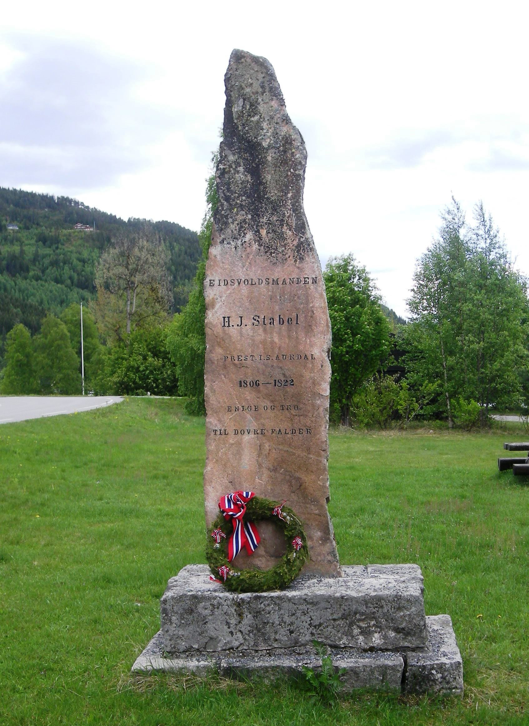 Minnebauta over Hans Jacob Stabel ved Bagn kirke, med krans lagt på 17. mai